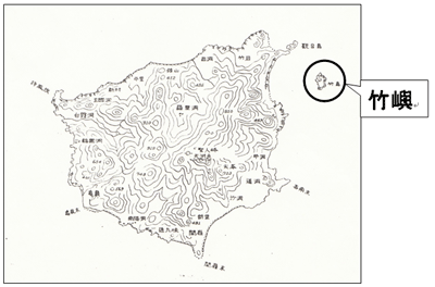 大韓民国慶尚北道鬱陵郡に属する島、鬱陵島と竹嶼